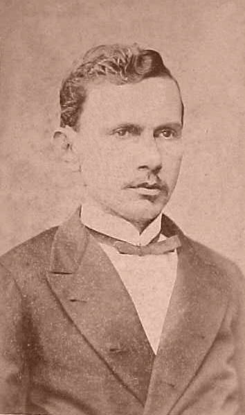 O político brasileiro João Alfredo Correia de Oliveira (1835-1915).